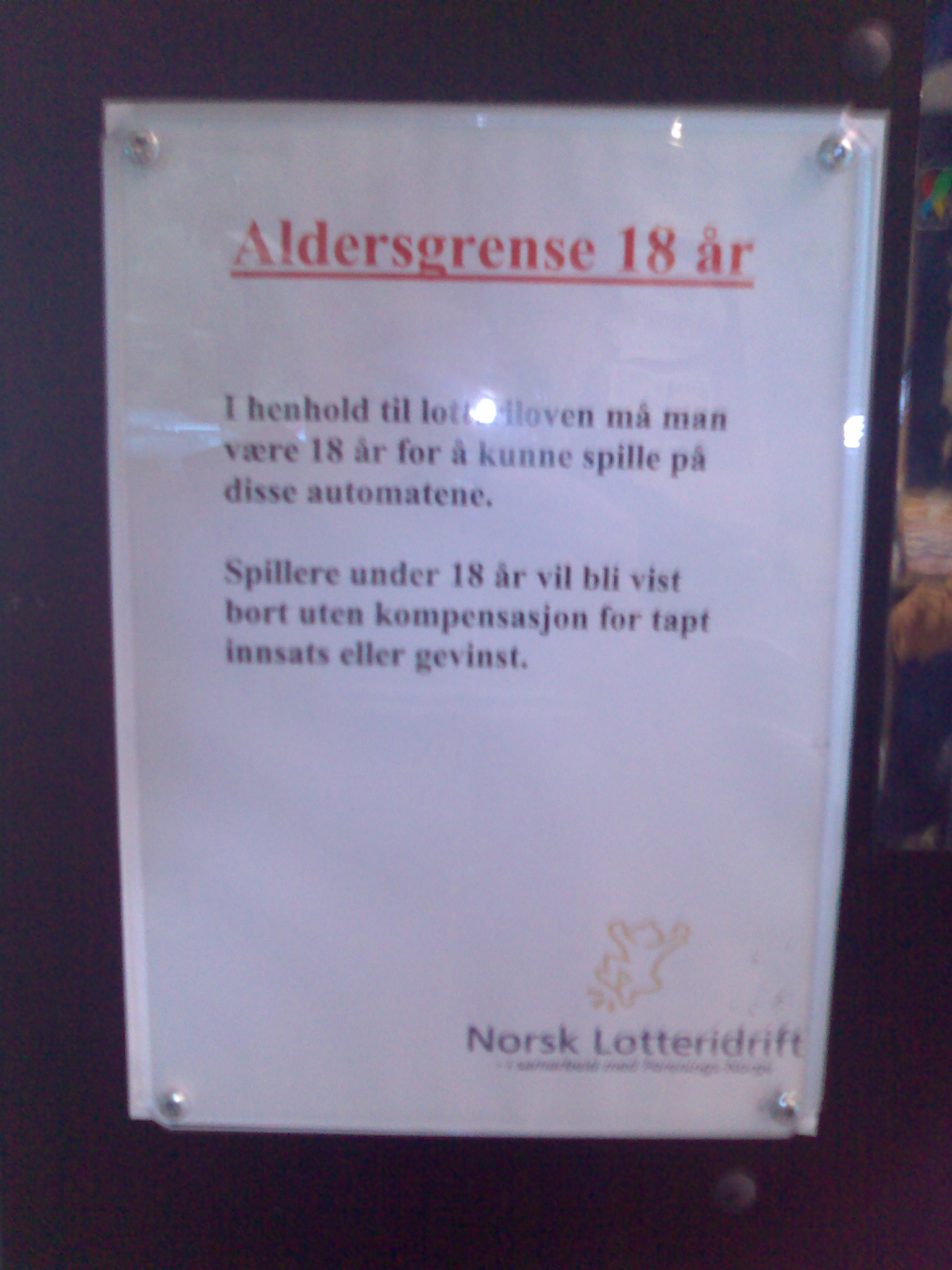 Forbudsskilt vedrørende underårig spilling.